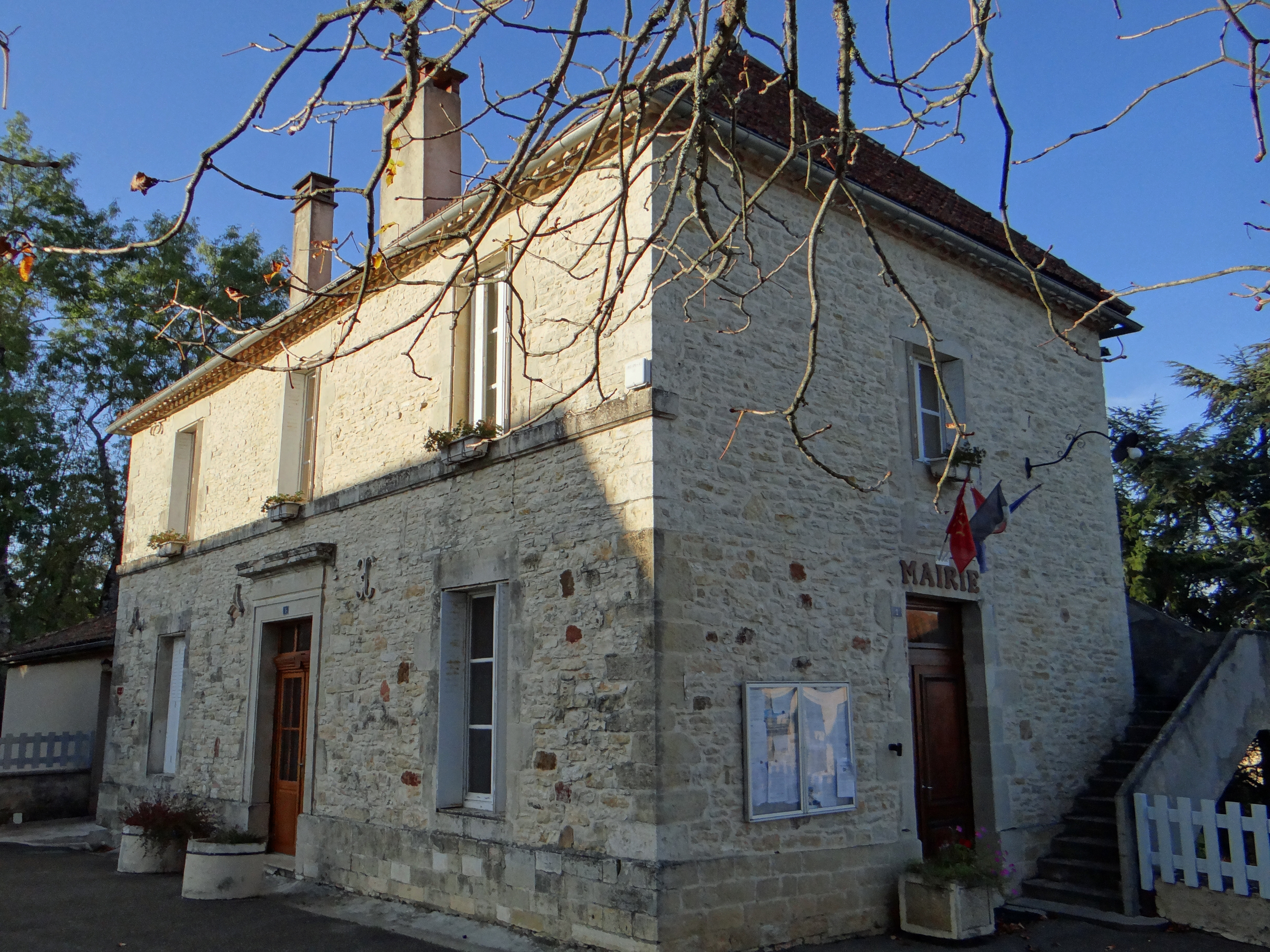 Lavercantière - Mairie-école